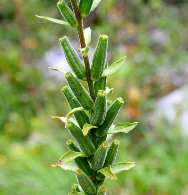 Oenothera_biennis (Enagra comune) Località : Cesa, Limana (BL), 330 m s.l.m.